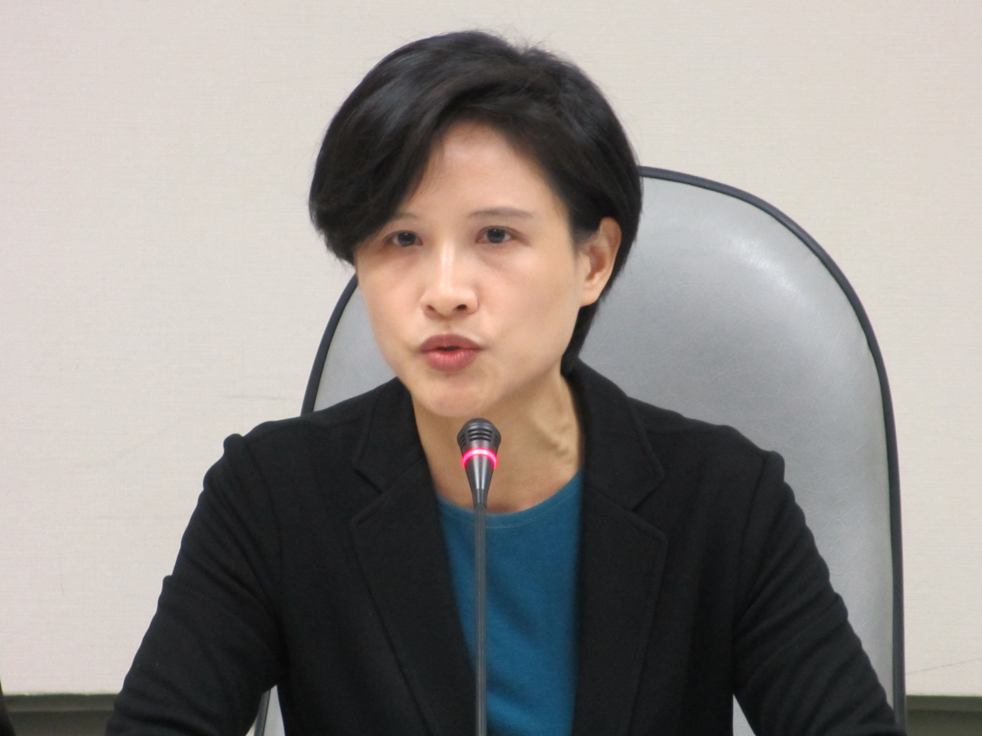 民主進步黨籍立法委員鄭麗君